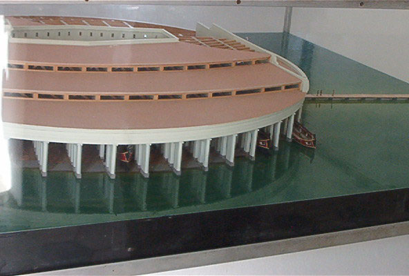 Maquette du port de Carthage à l'époque punique